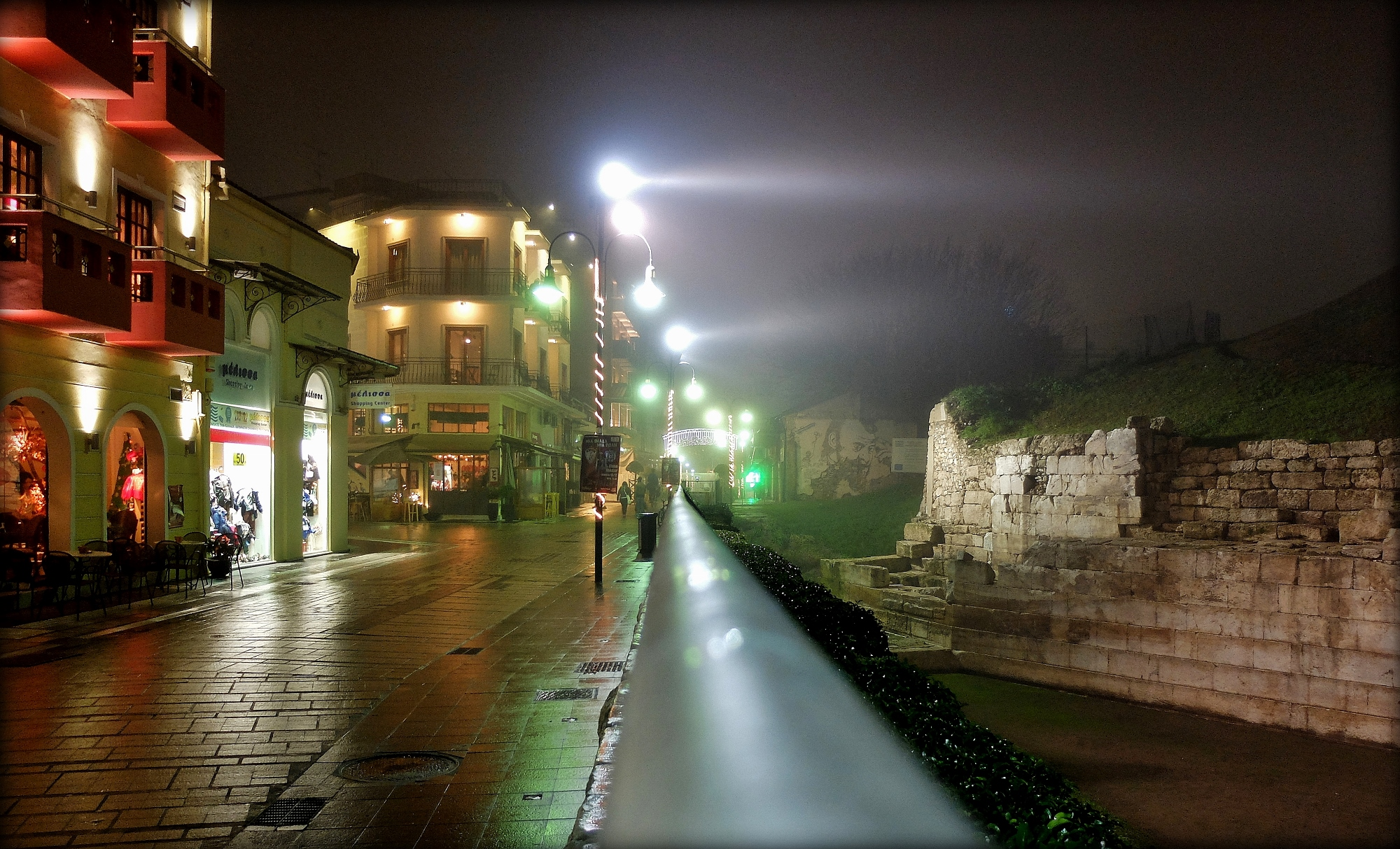 Αρχαίο θέατρο Α΄ Λάρισας«Πρώτο Αρχαίο Θέατρο Λάρισας»